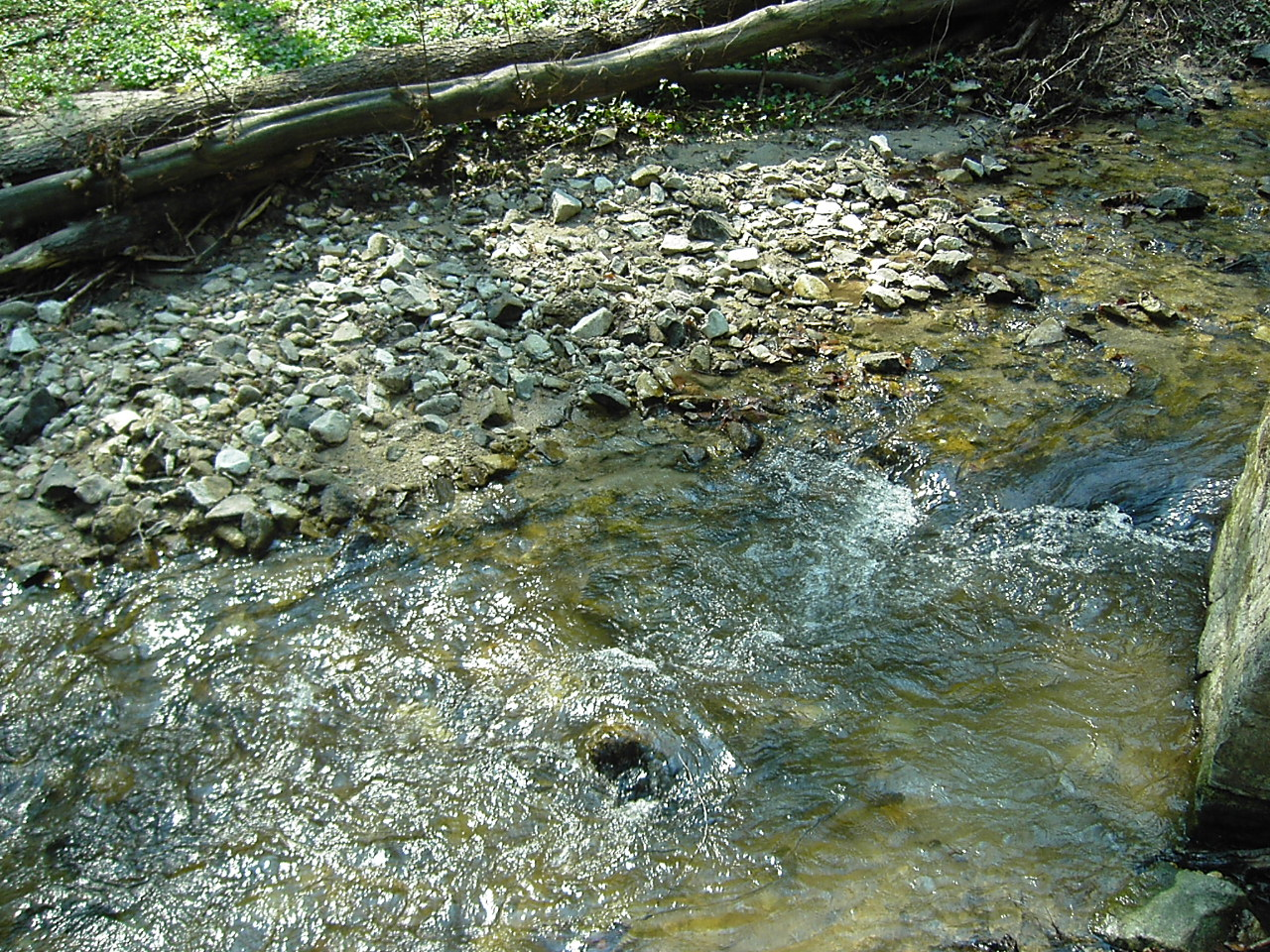 Vydrica creek, Bratislava, Slovakia